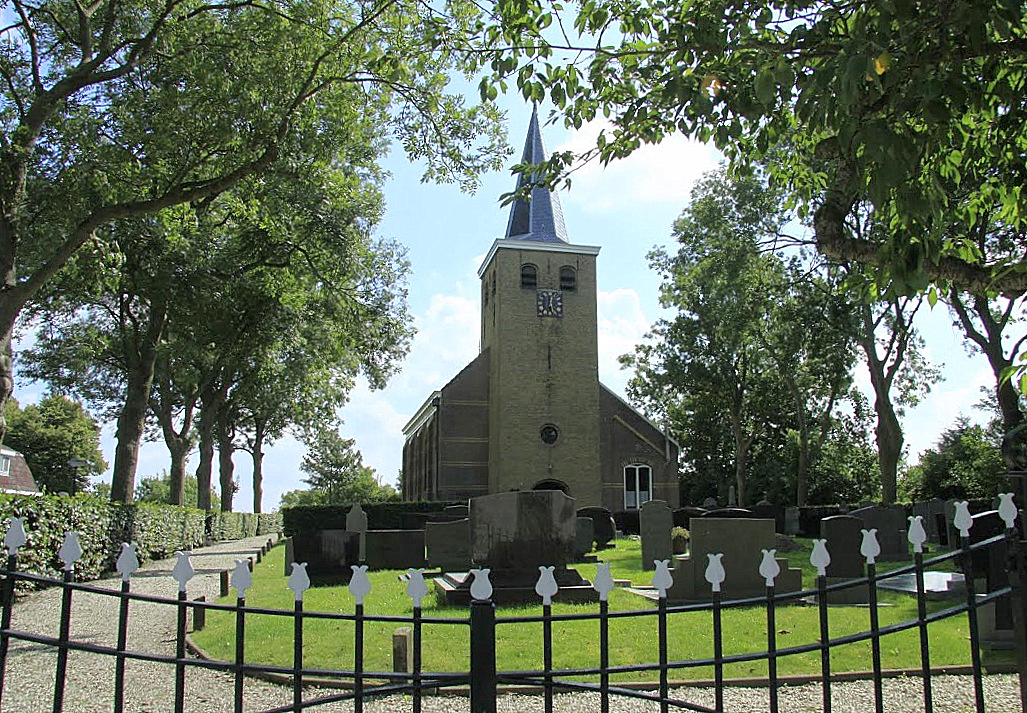 Mooi in de bomen staat de Hervormde kerk van Hitzum in Friesland te pronken in de zon.